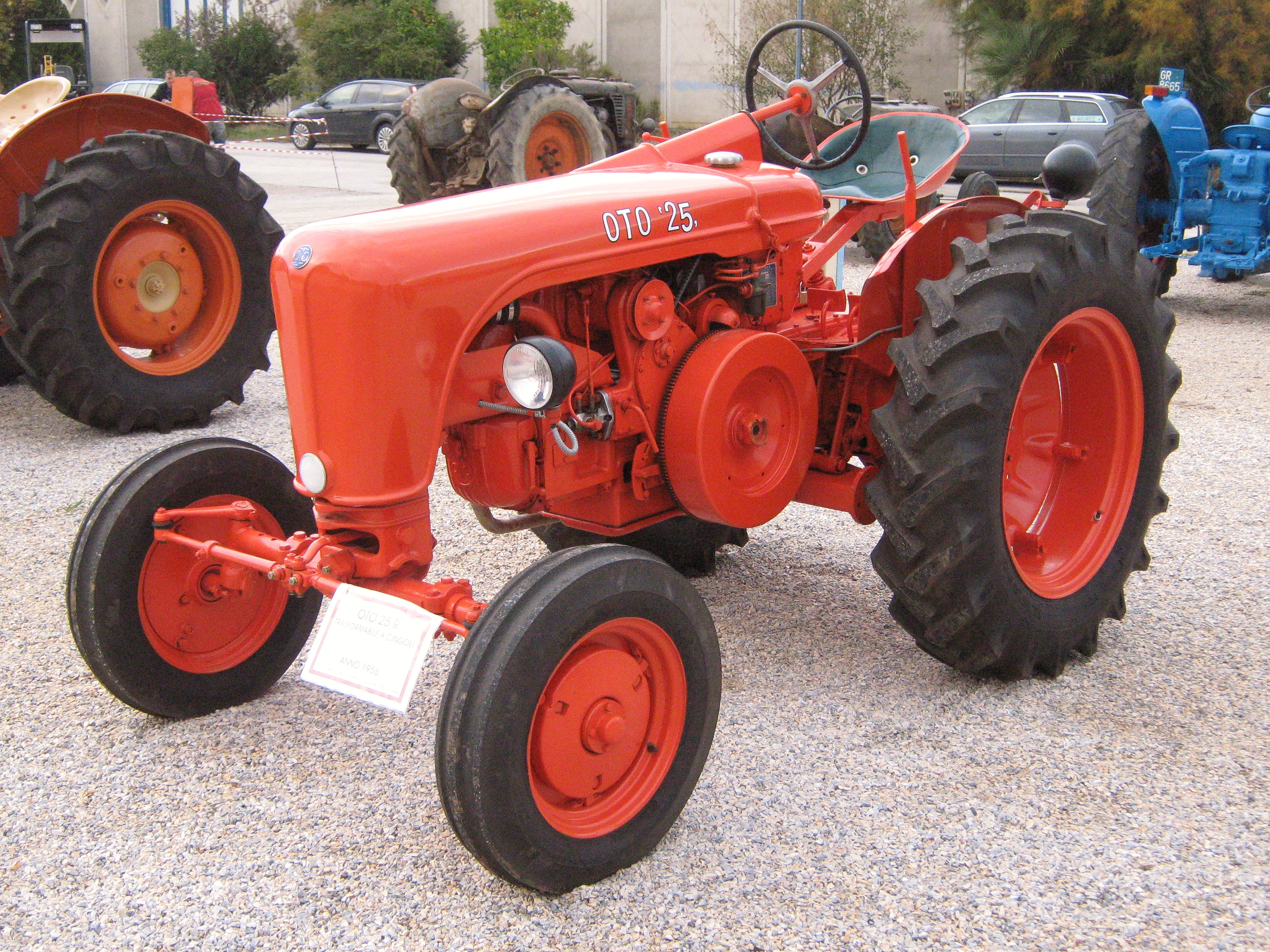 Trattore OTO 25 esposto all'Expo Model di Venturina (Provincia di Livorno) nel 2011